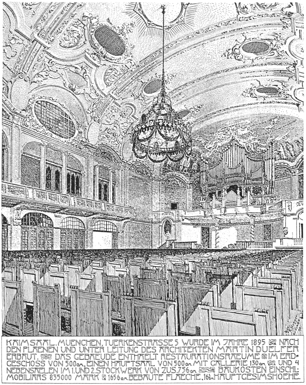 Zeichnung des Kaimasaals in München, 1895 von Martin Dülfer